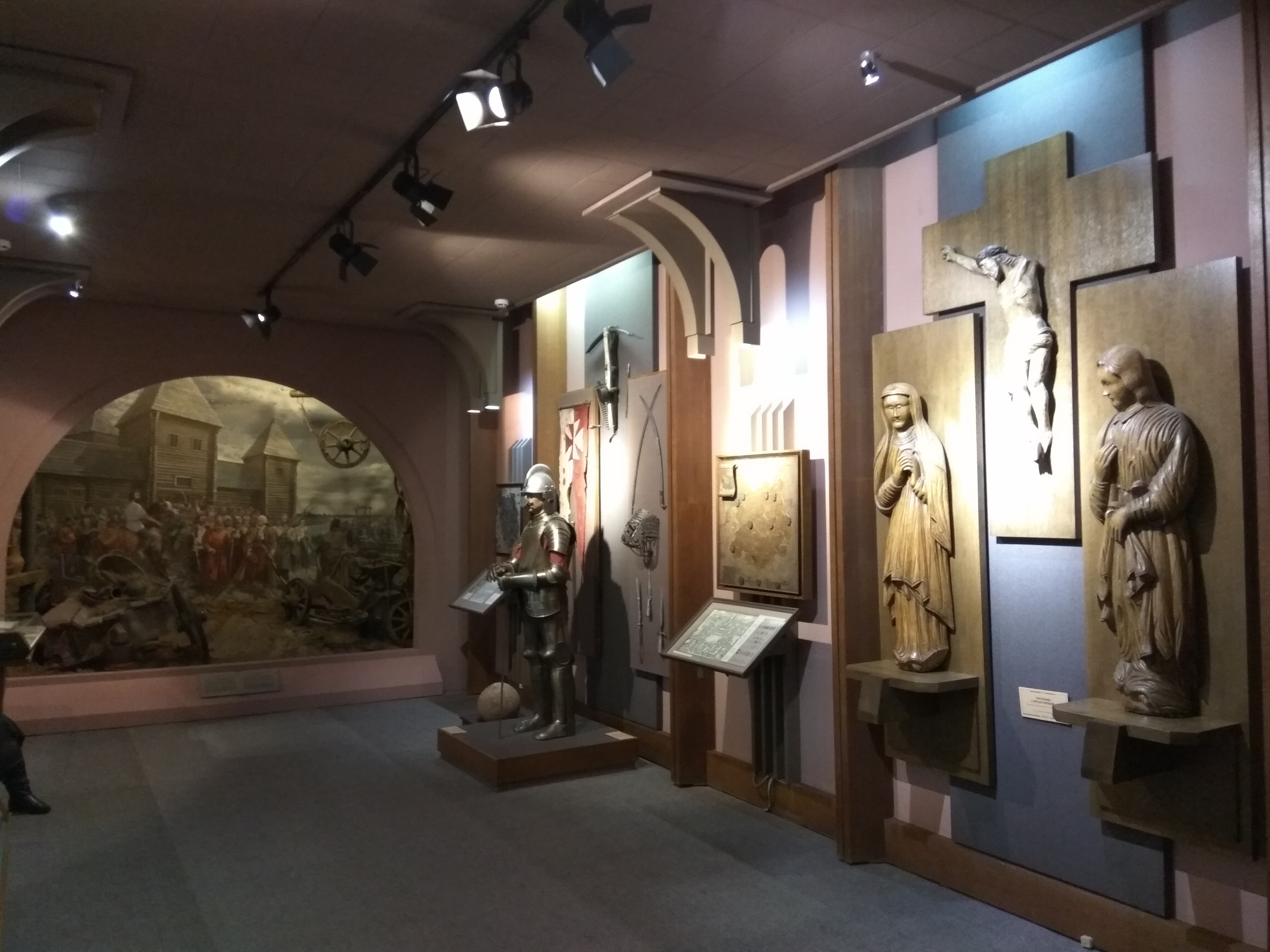 Магілёўскі абласны краязнаўчы музей. Гісторыя краю з IX ст. да 1917 г.